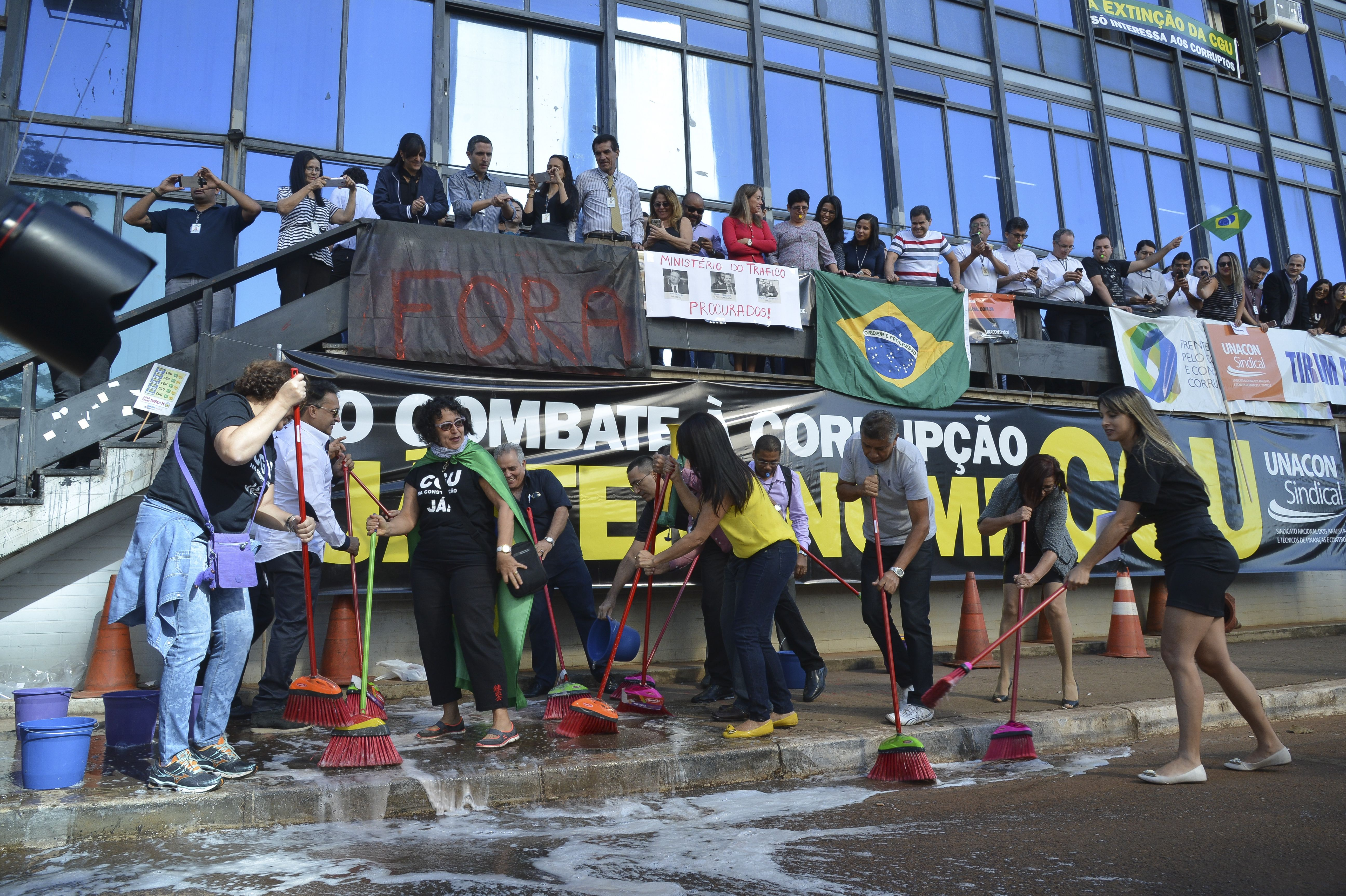 Brasília - Servidores da extinta CGU fazem ato para pedir a exoneração do ministro da Transparência, Fiscalização e Controle, Fabiano Silveira (Antonio Cruz/Agência Brasil)